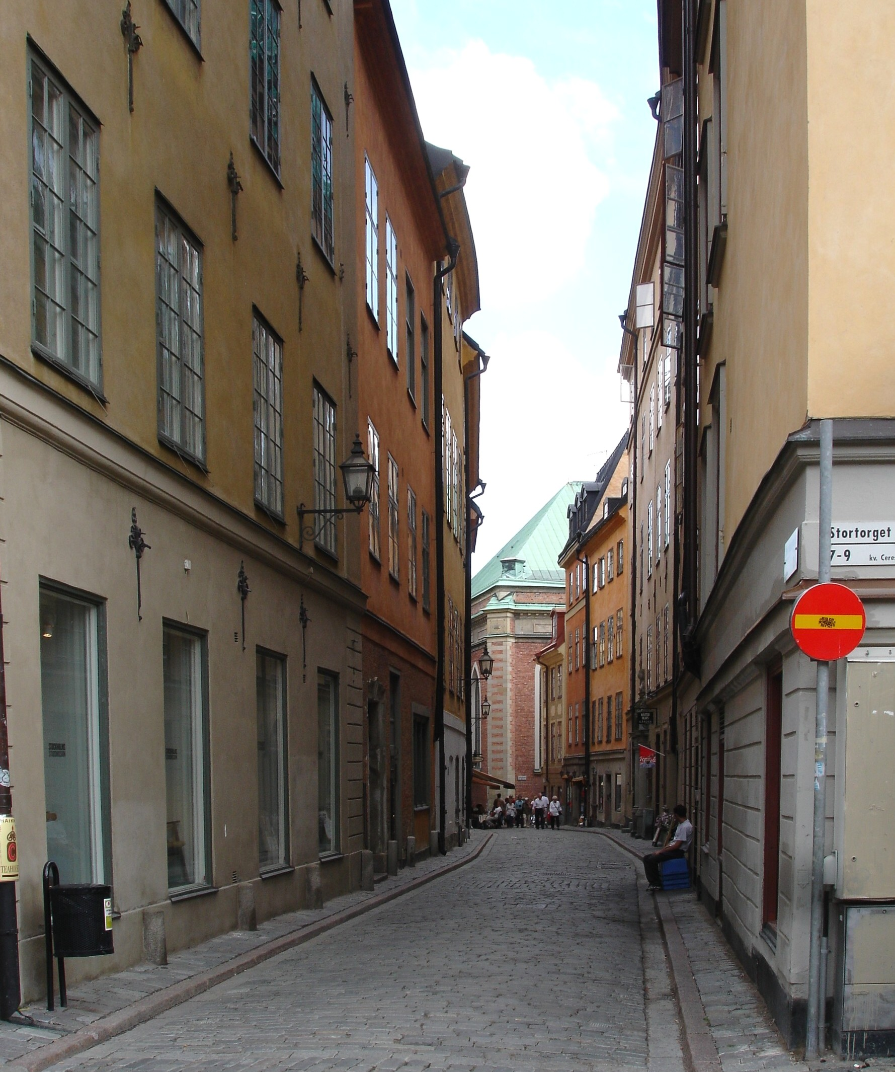 Kvarteret Cepheus, Gamla stan, Stockholm